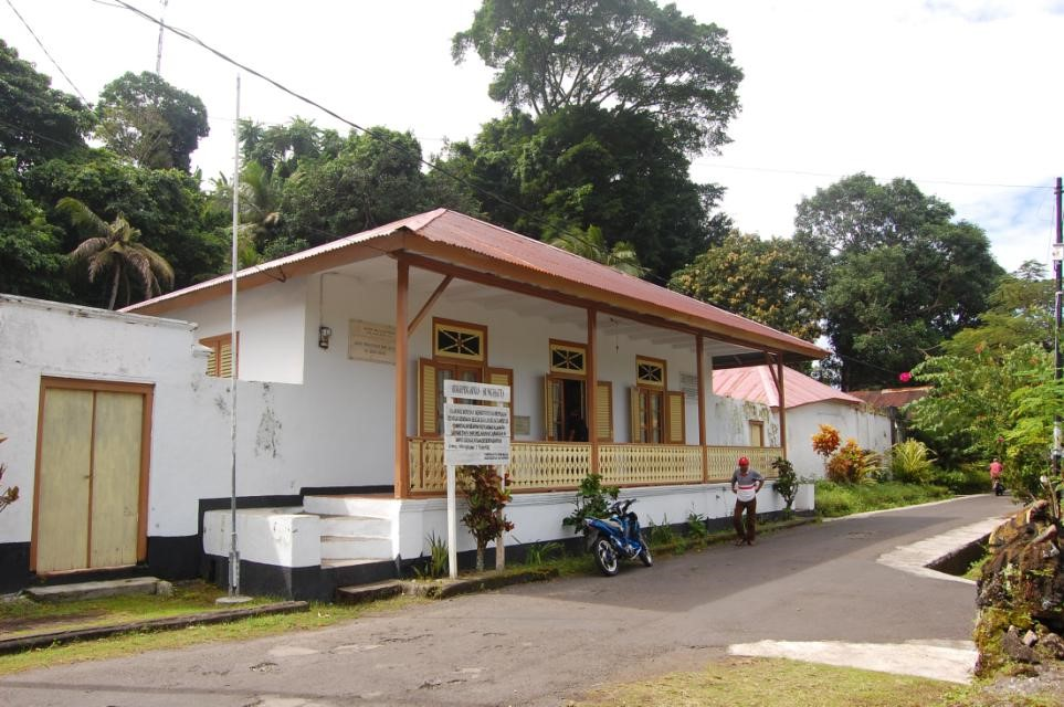 RUMAH PENGASINGAN BUNG HATTA